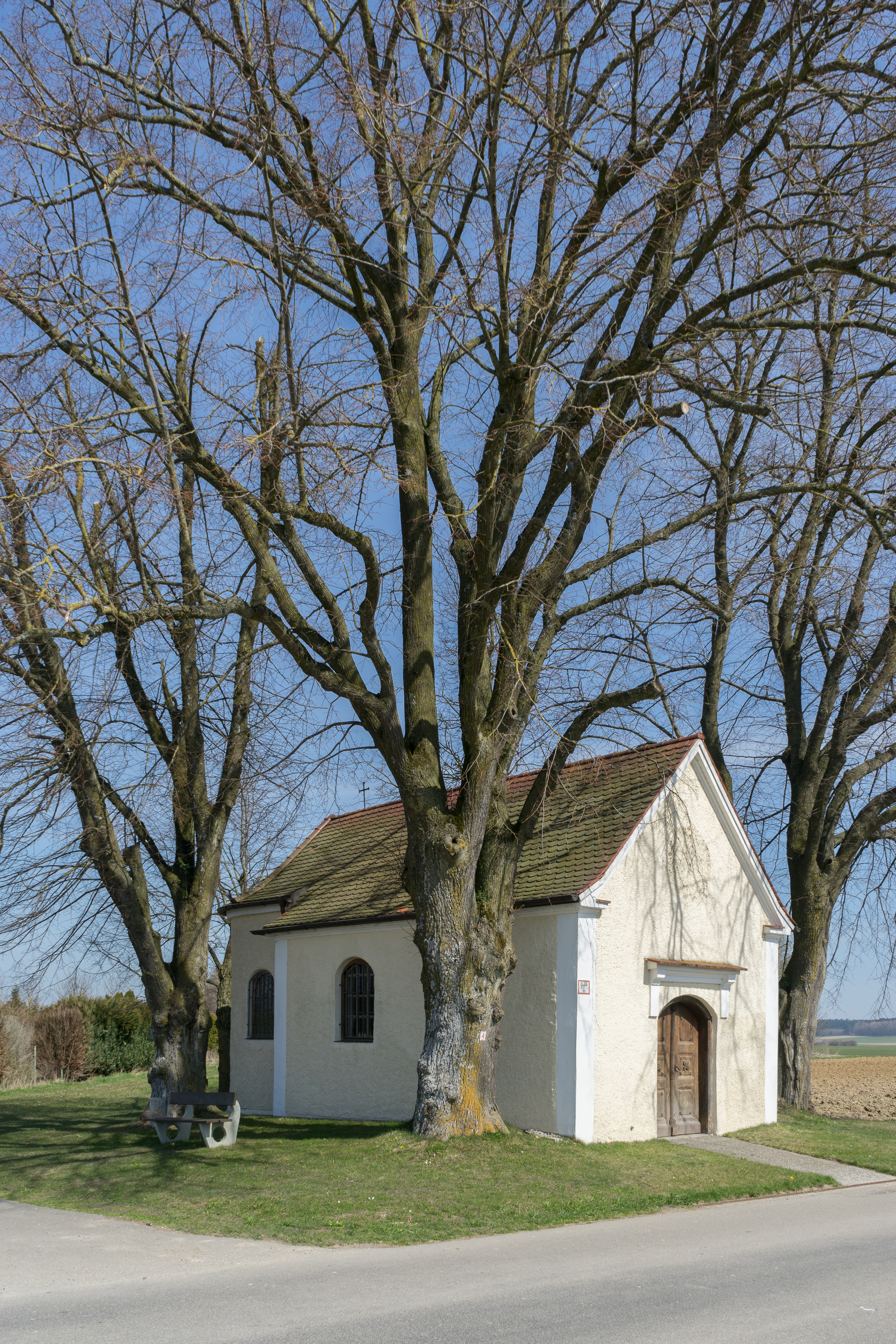 Satteldachbau mit halbrundem Schluss, um 1700, im 19. Jahrhundert renoviert; mit Ausstattung